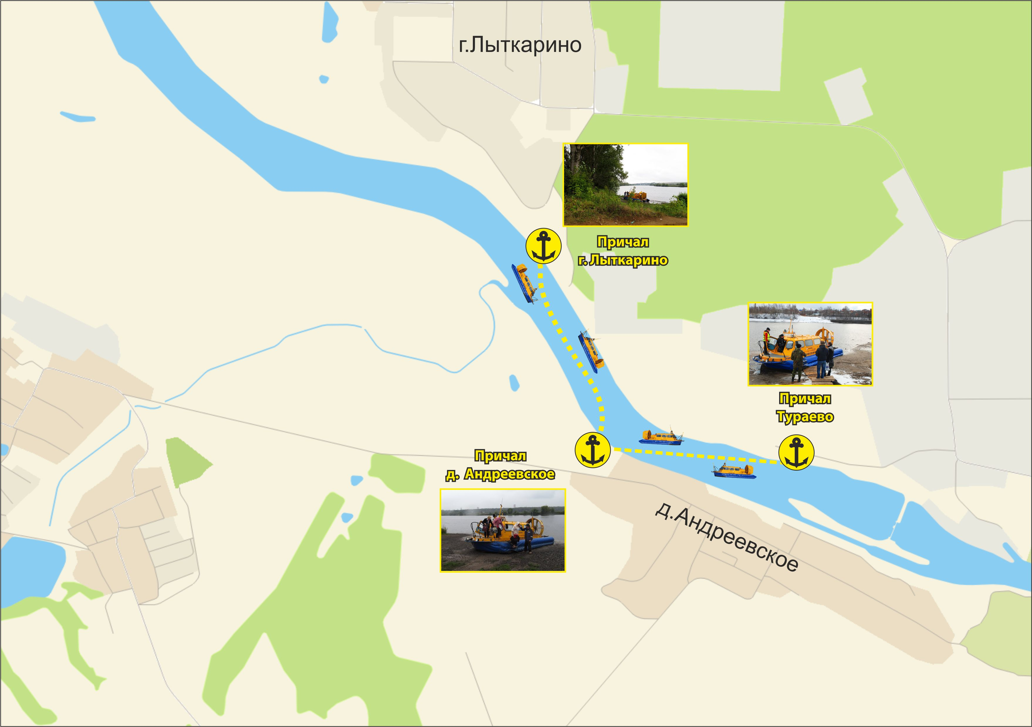 Маршрут речной круглогодичной пассажирской переправа с применением судов на воздушной подушке между д. Андреевское Ленинского района и г. Лыткарино в Московской области. Работает с декабря 2011 г. На линии работают СВП Хивус-10.